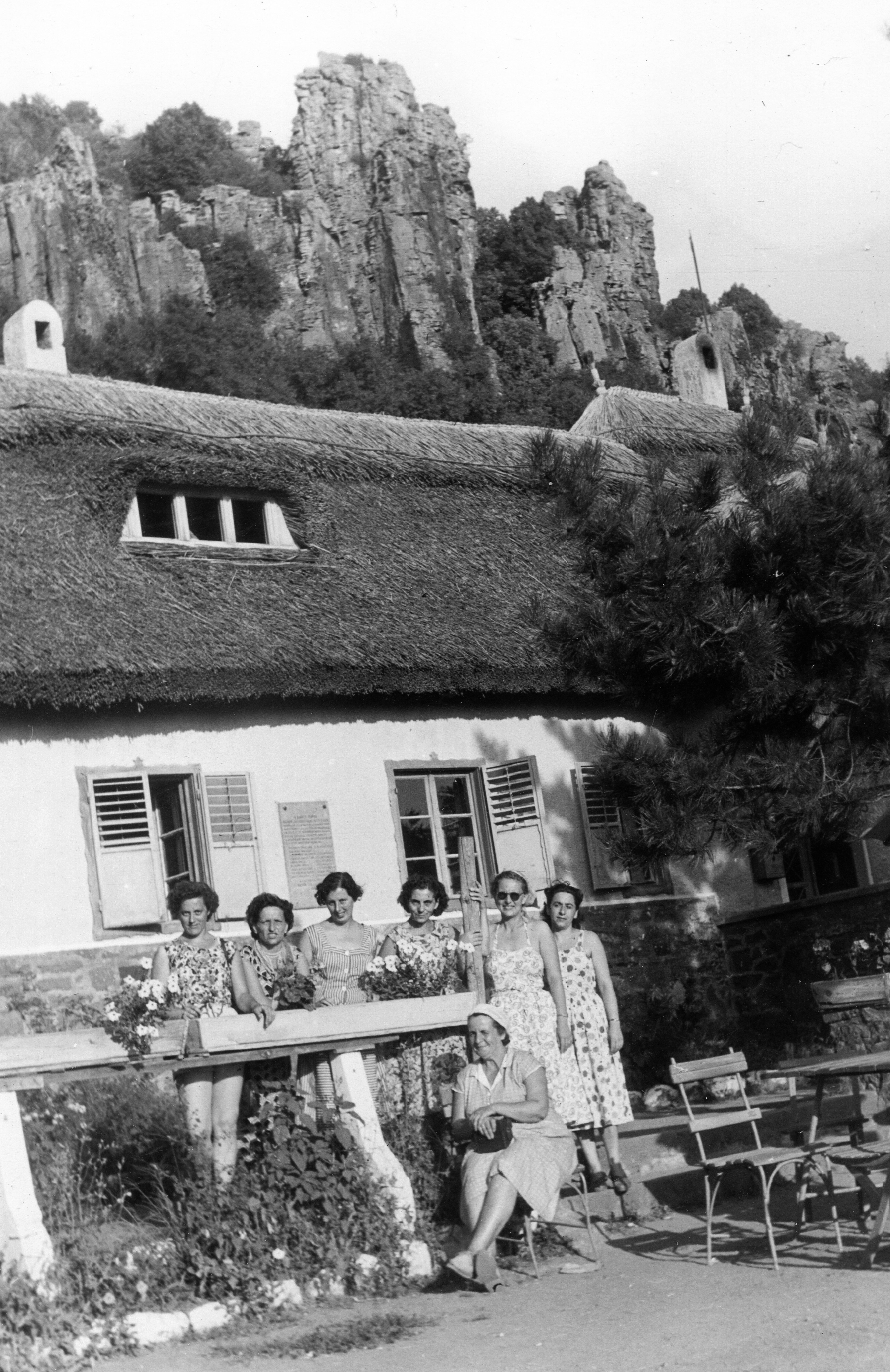 Rodostó turistaház. Location: Hungary, Badacsony Title: Rodostó turistaház.